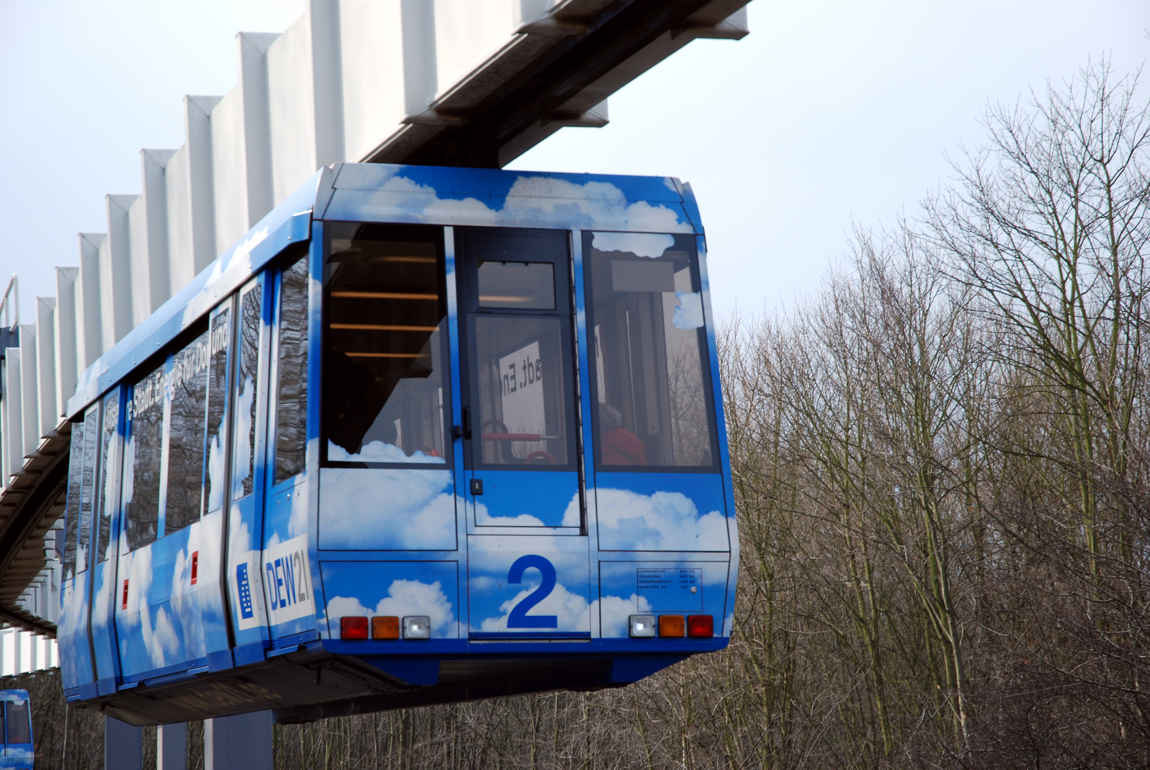 Dortmund-Eichlinghofen, TU Dortmund, Campus Süd, H-Bahn